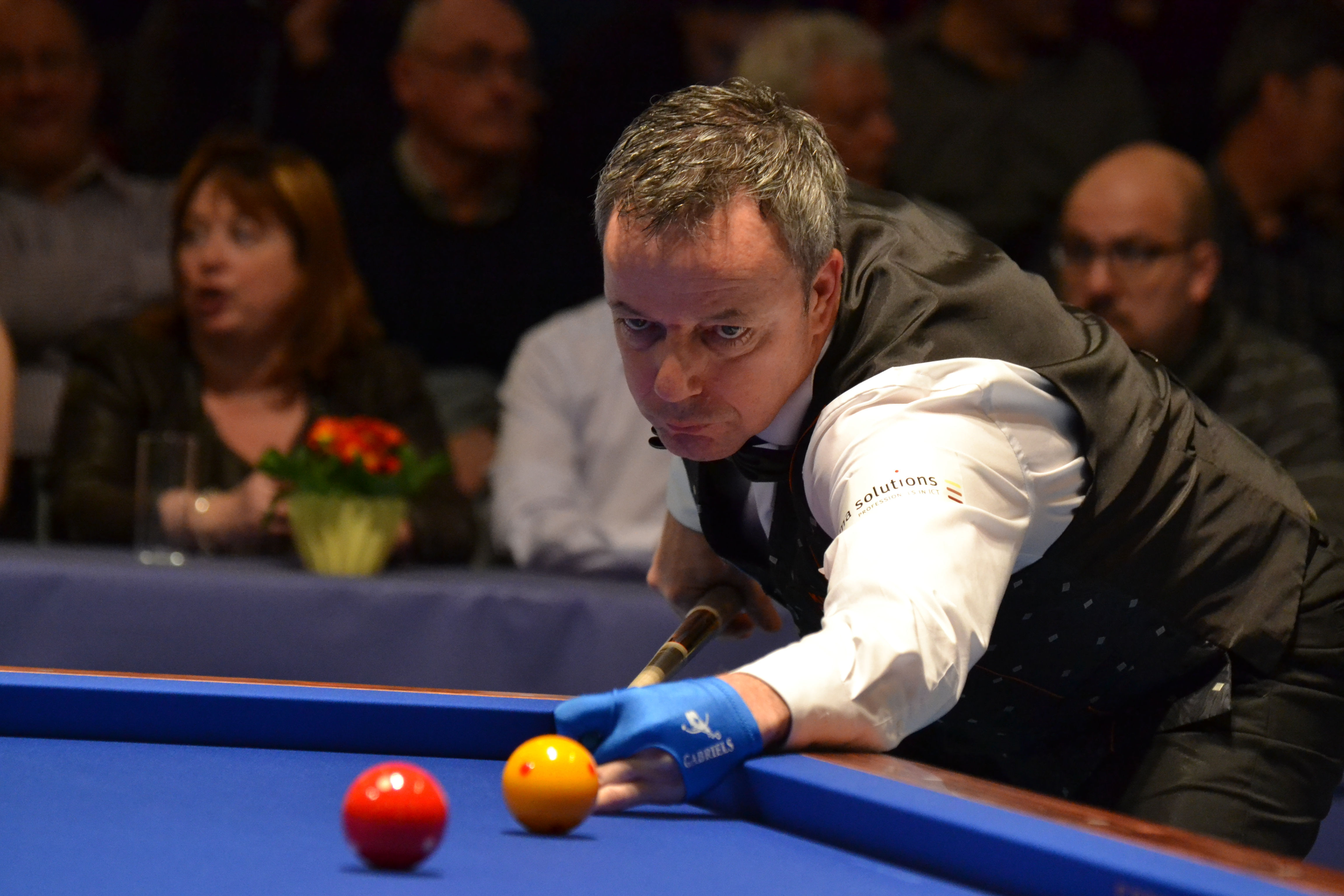 Dick Jaspers, WK Viersen (GER)